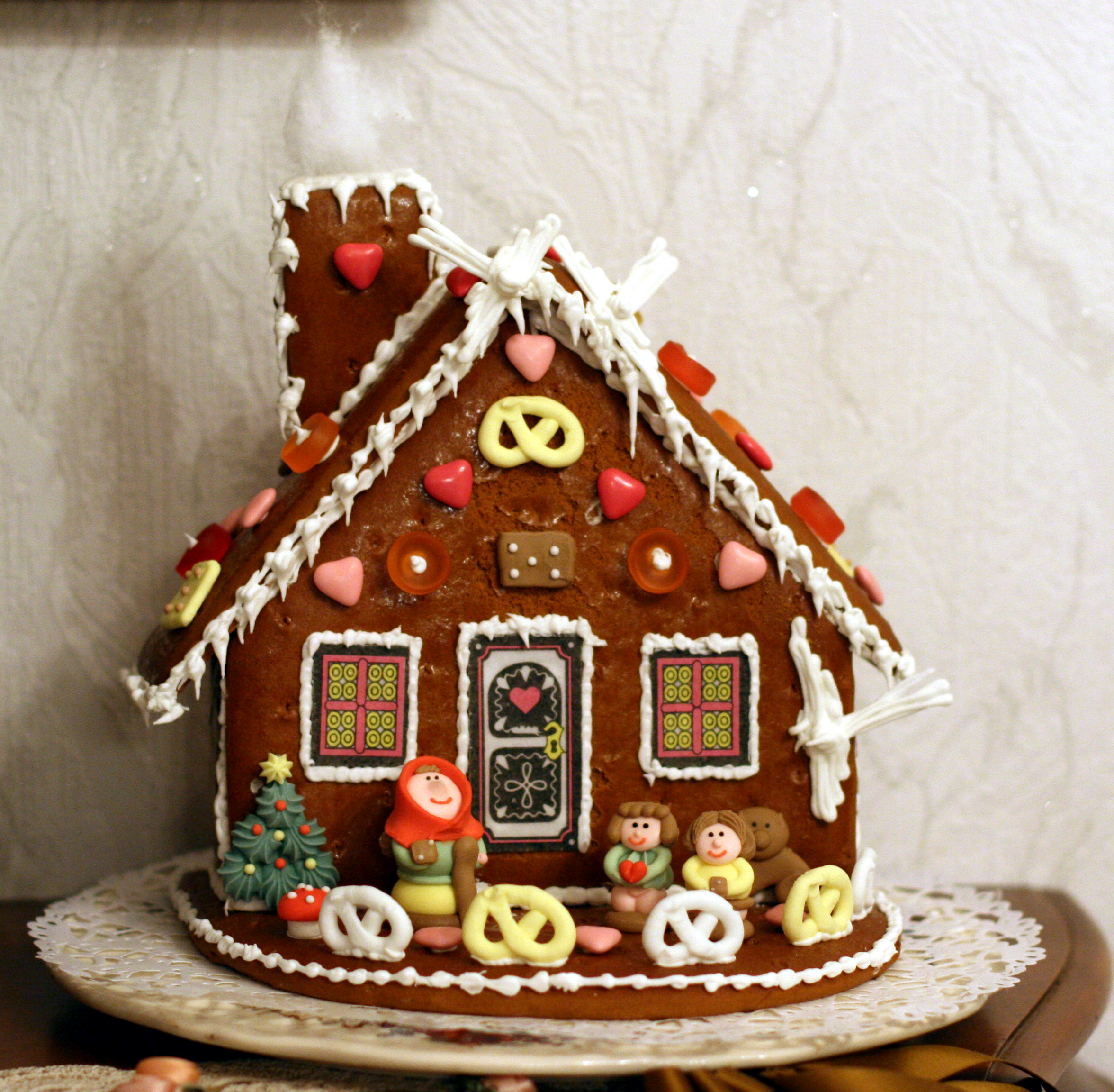 Coucou tout le monde, Je suis de retour sur flick'R après quelques semaines d'absence et je vous présente la dernière création de mon papa, "la maison en pain d'épices" Tout est comestible sauf, devinez quoi ? alors ?????? la fumée qui sort de la cheminée : c'est du coton ! fallait trouver l'idée n'est-ce pas ? Gros bisous à mon cher Papounet. This is a gingerbread house made by my father. You can eat everything except one thing, can you find it what it is ? the smoke coming out of the chimney: it is cotton